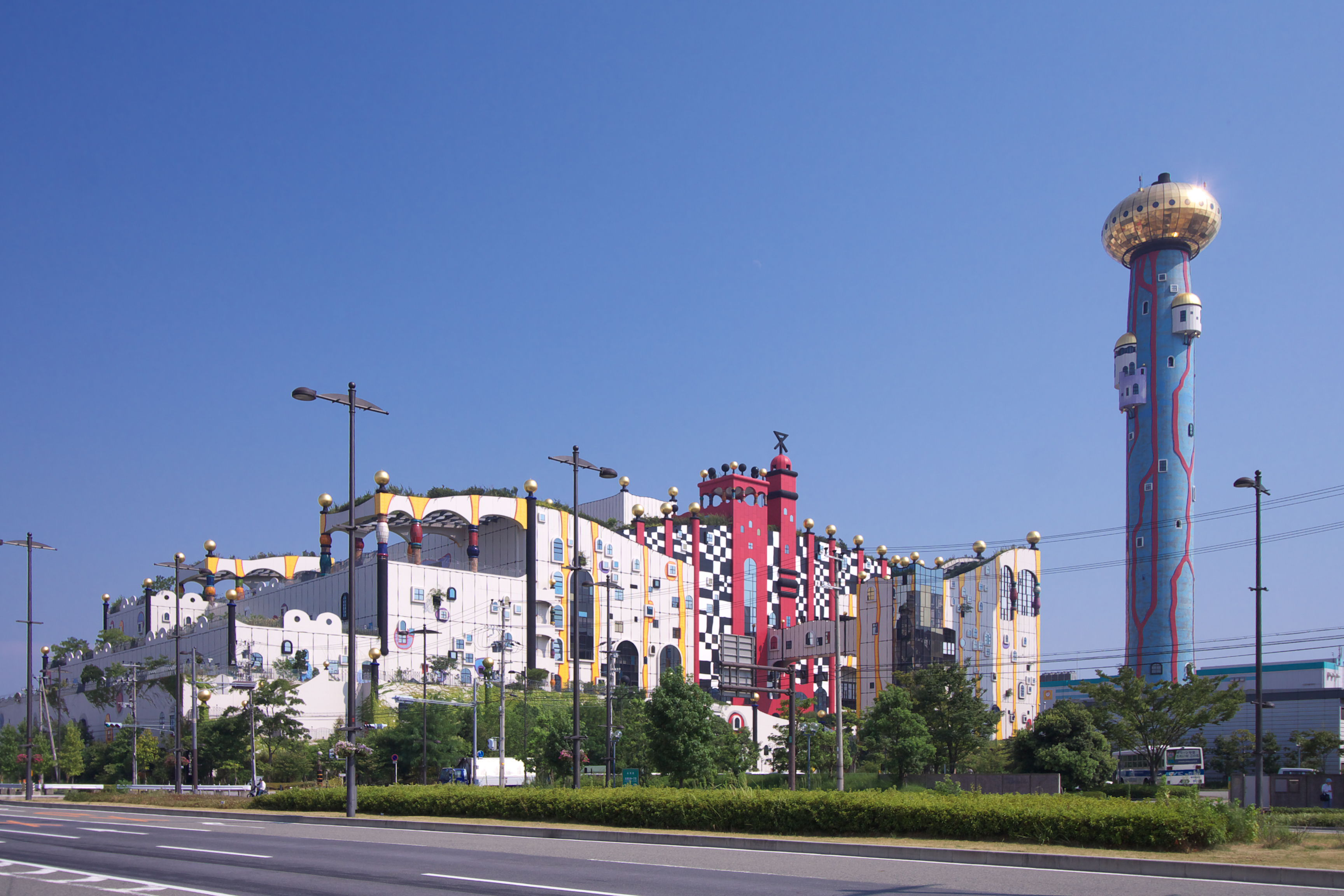 大阪市環境局舞洲工場（大阪市, 日本）